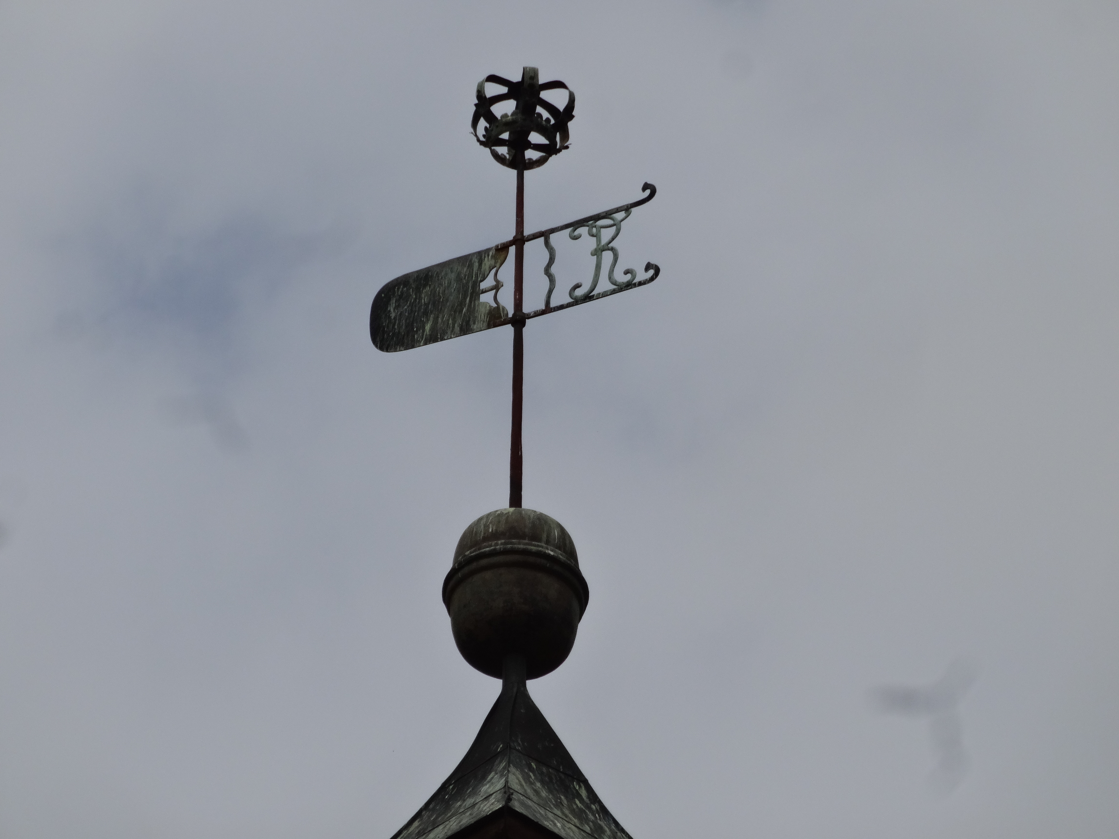 Dorfkirche Nudow, eine der wenigen Kronkirchen in Brandenburg aus dem 18. Jahrhundert. Gemeinde Nuthetal, Landkreis Potsdam-Mittelmark.